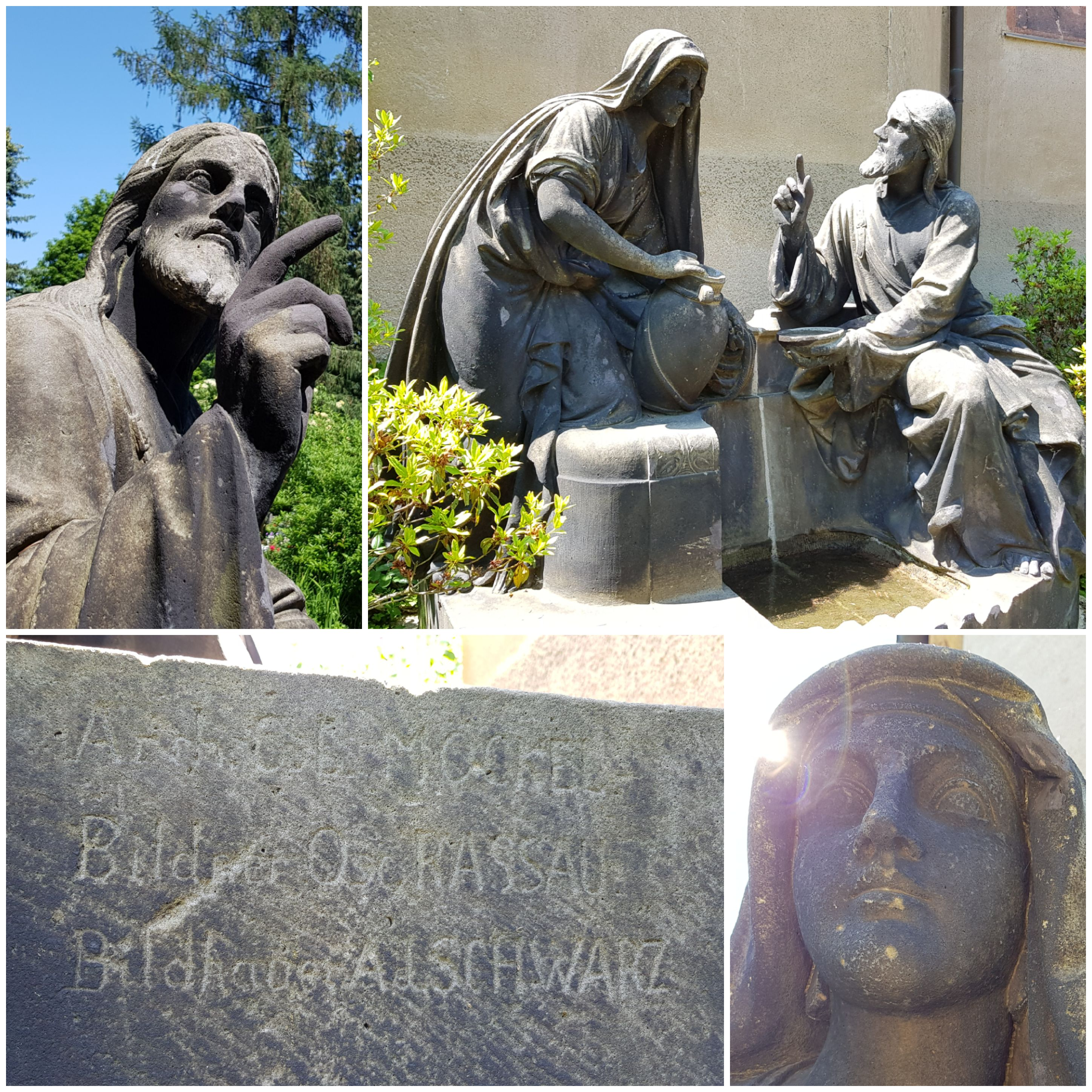 Samariterbrunnen in Hainichen von Oskar Rassau & Adolf Schwarz & Gotthilf Ludwig Möckel; Source of the single pictures: my own work